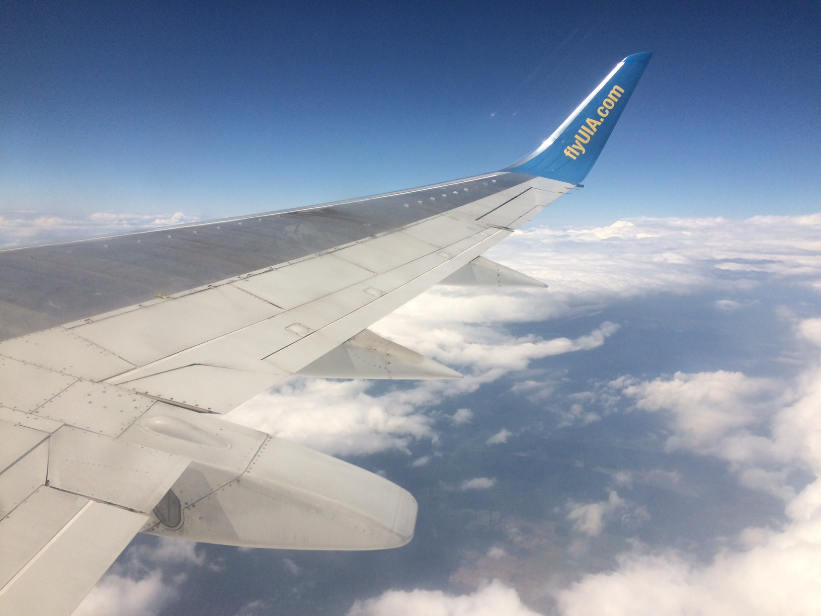 Винглет - законцовка крыла Боинг 737-800